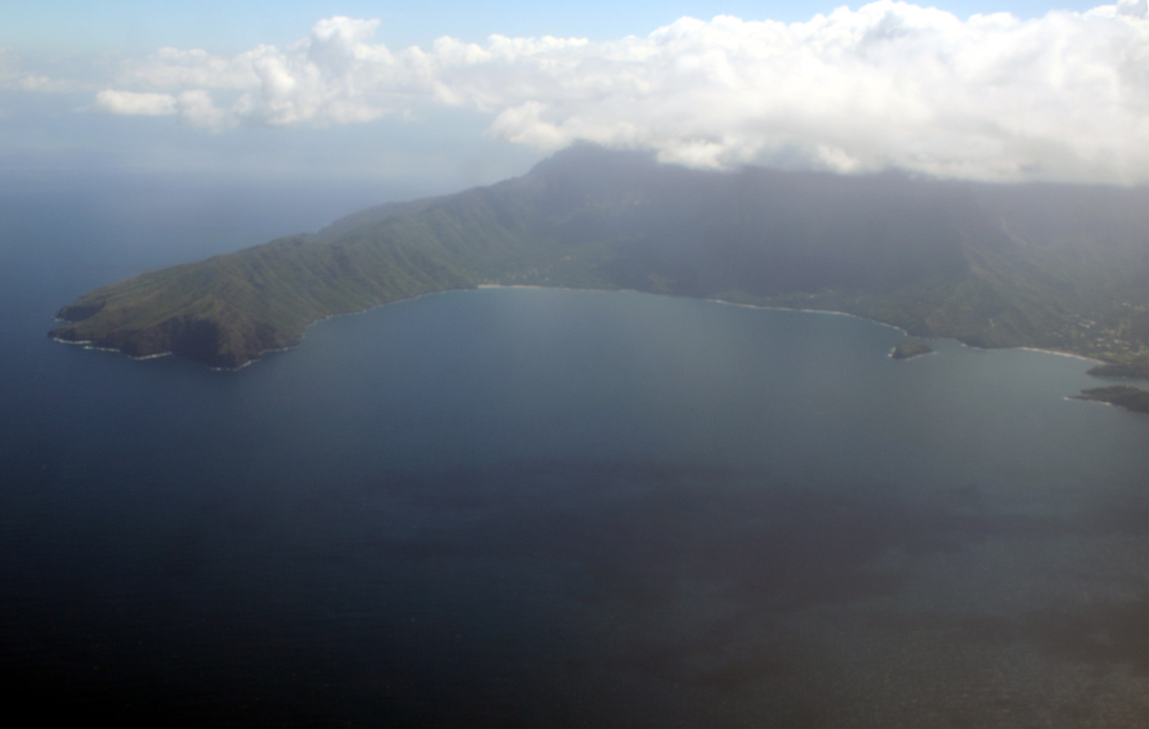 Baie de Taaoa ( Hiva Oa ) vue d'avion